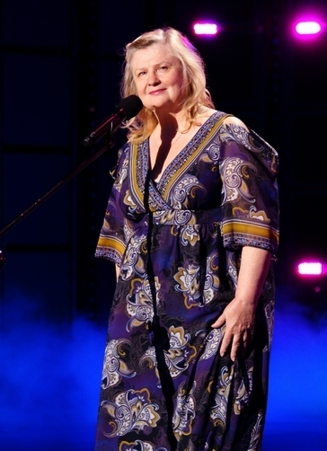 Stanisława Celińska @ 46. KFPP in Opole.